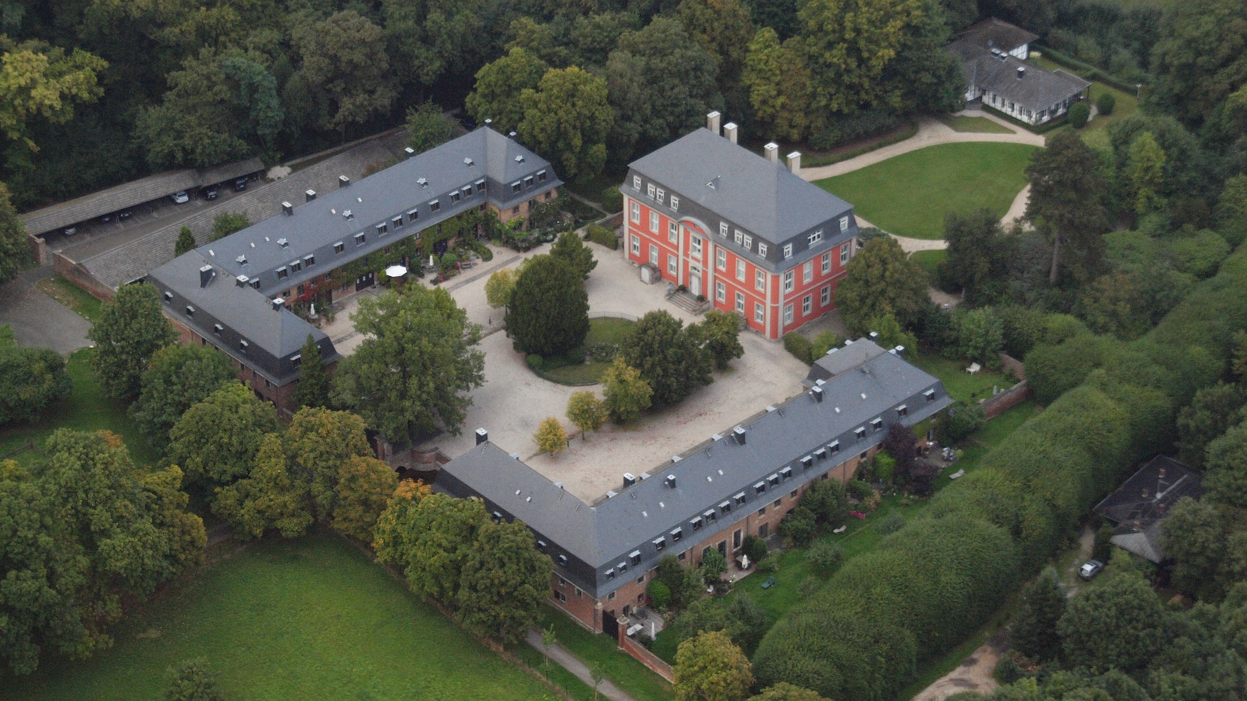 Schloss Rösberg: Gesamtanlage, Luftaufnahme